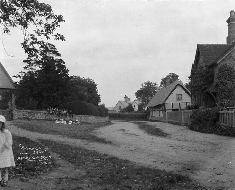 Ffotograffydd/Photographer: P B Abery (1877?-1948) Dyddiad/Date: [191-?] Cyfrwng/Medium: Negydd gwydr / Glass negative Maint/Dimensions: 119 x 163 mm. Cyfeiriad/Reference: PBA71/47 Rhif cofnod / Record no.: 4540991 Rhagor o wybodaeth am gasgliad P B Abery yn Llyfrgell Genedlaethol Cymru More information about the P B Abery Collection at the National Library of Wales